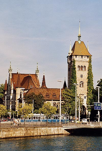 Zürich: Schweizerisches Landesmuseum